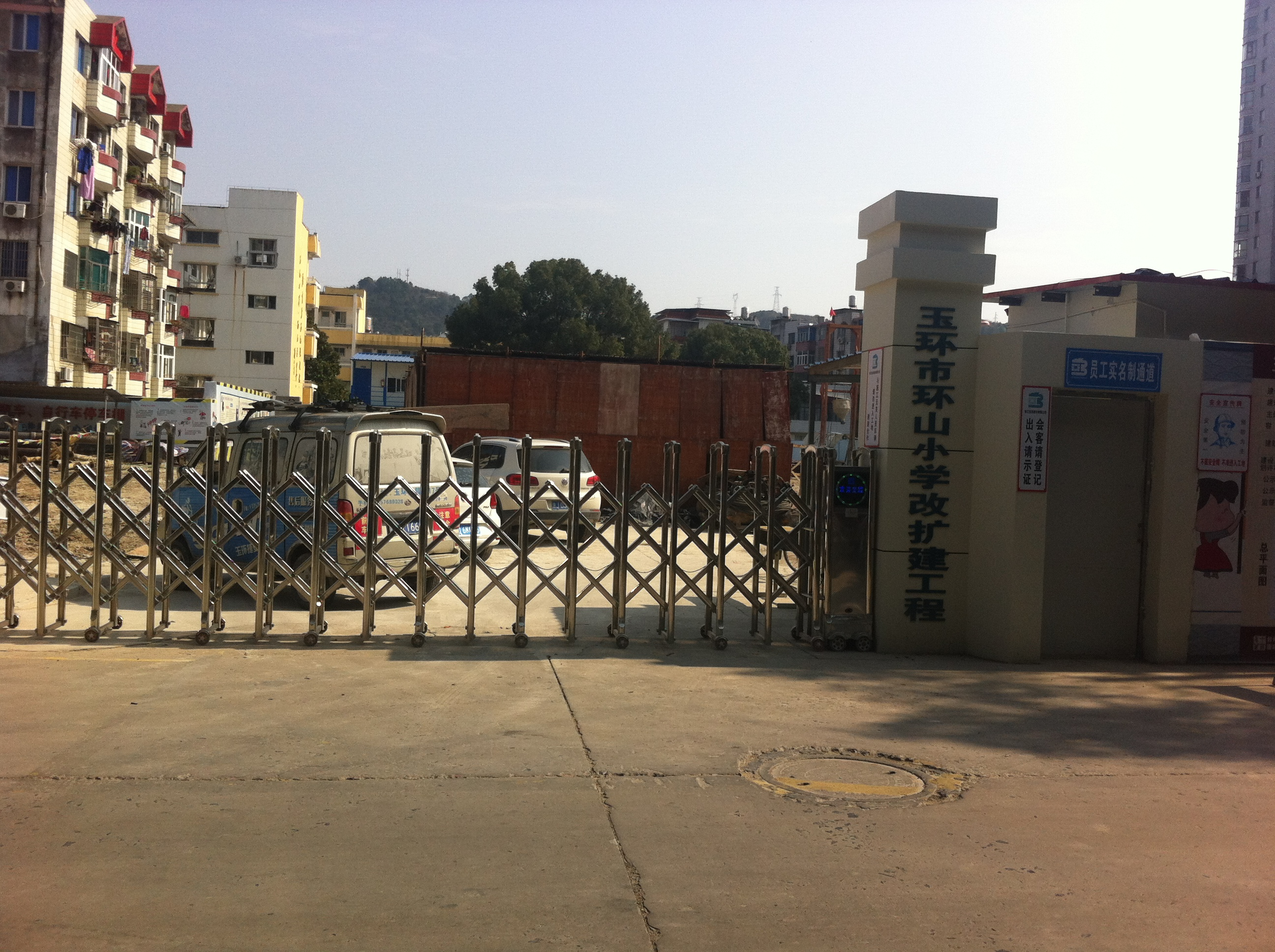 中文（中国大陆）: 玉环市环山小学改扩建工程现场